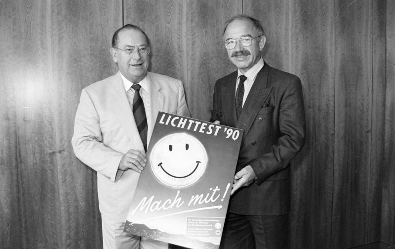 28.8.1990 Der Bundesminister für Verkehr (BMV), Dr. Friedrich Zimmermann (links), empfängt den Präsidenten des Zentralverbandes des Deutschen Kraftfahrzeugverbandes (ZDK), Bernhard Enning, anläßlich der Eröffnung der Aktion Lichttest 1990 - im Bundesministerium für Verkehr